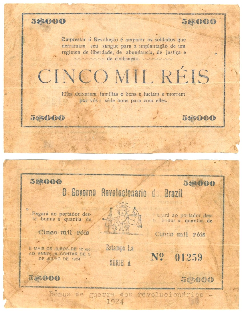 Bônus de guerra utilizado pelos revolucionários de 1924.